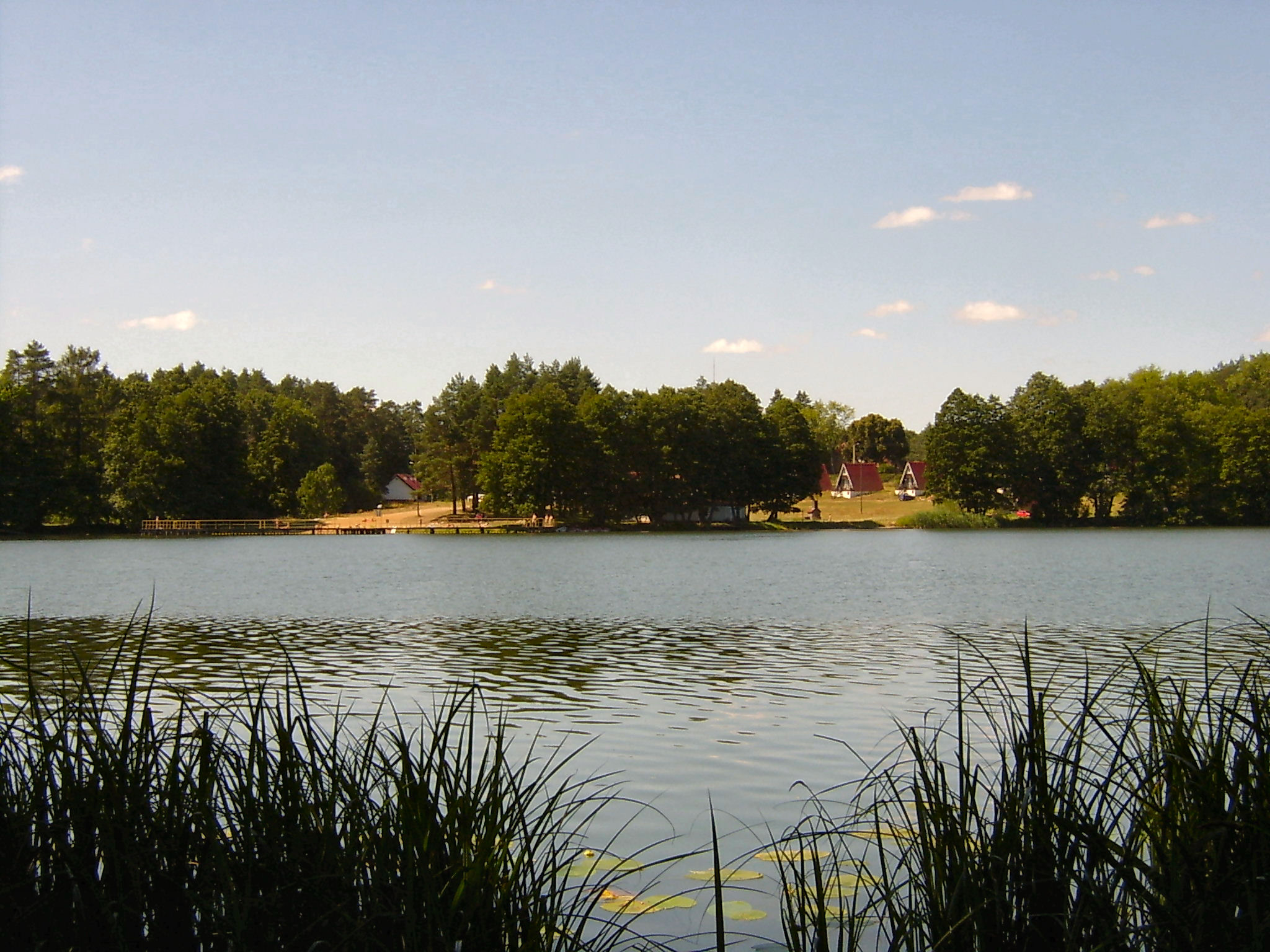 Jezioro Lubie - obok miejscowości Lipy, gmina Kłodawa, woj. lubuskie, Poland